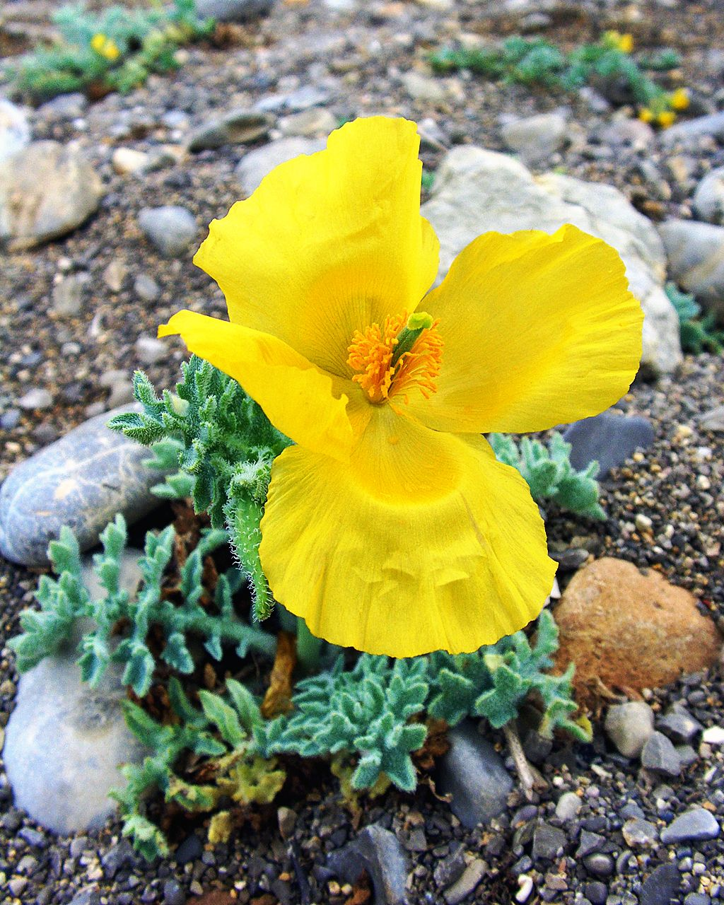 Glaucium flavum